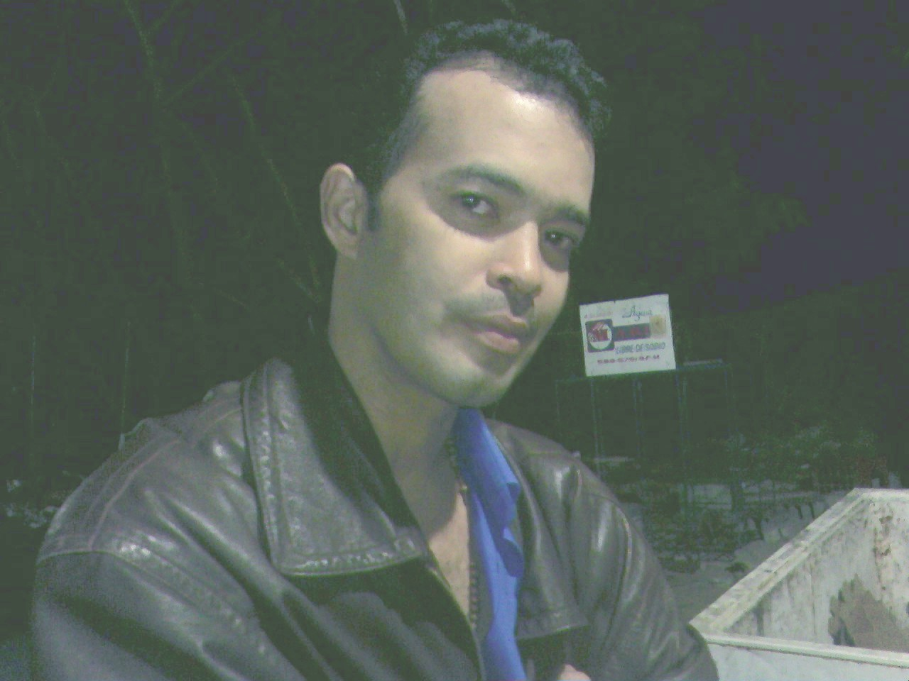 Alex Bueno.